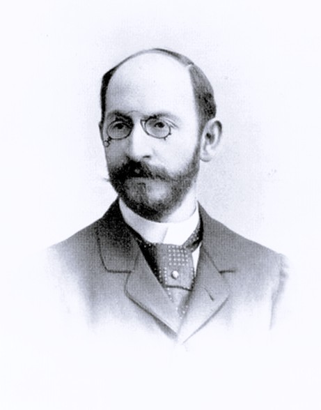 Max Steinthal